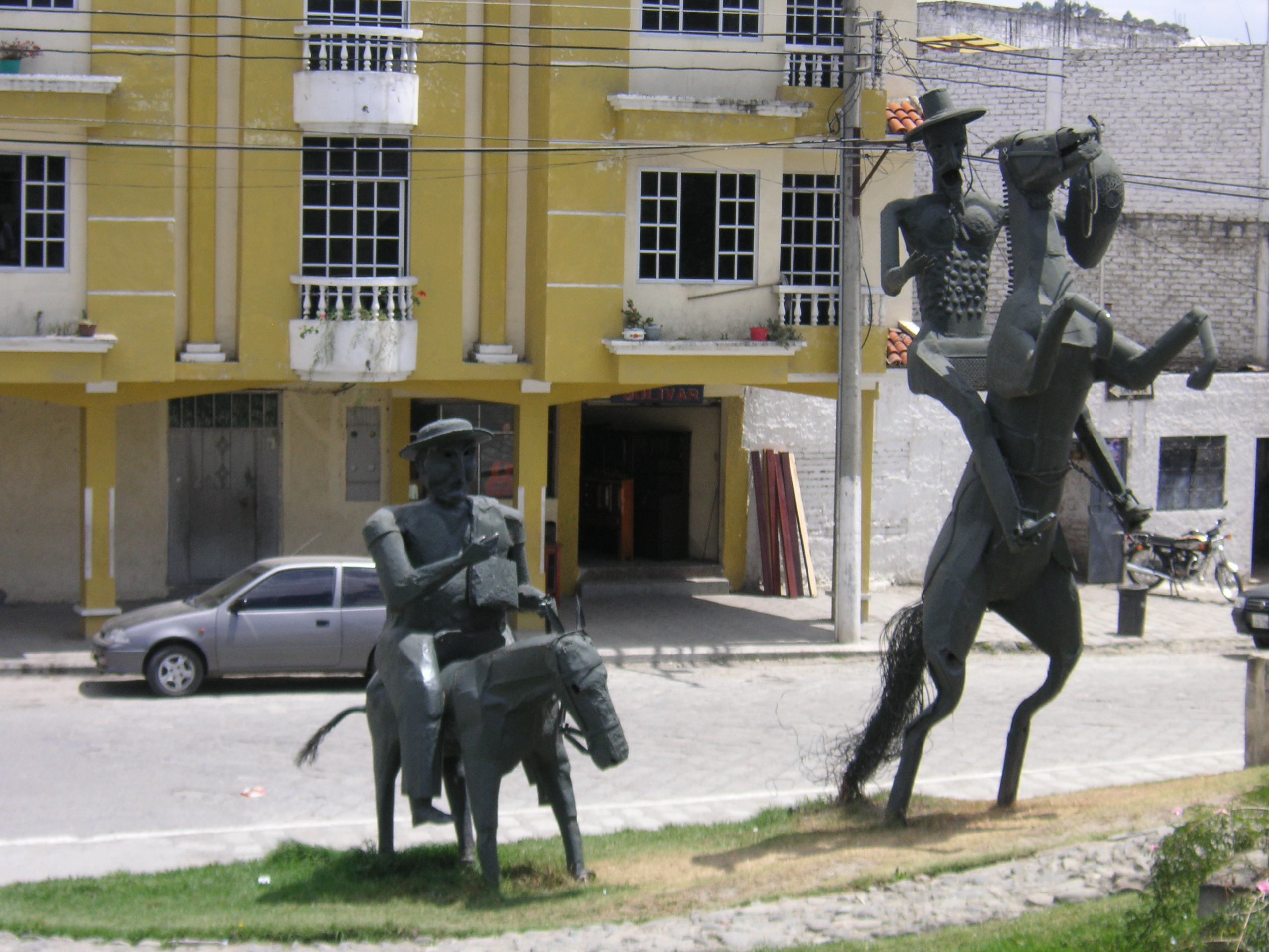 Runa Simi: Don Quijote, Makas, Ikwadur.